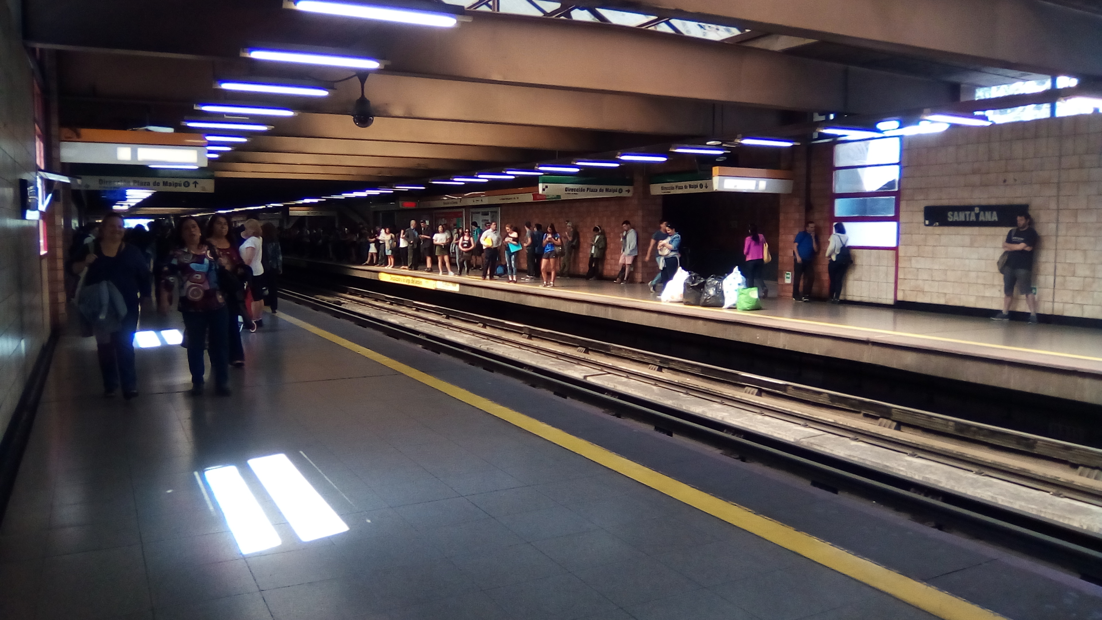 Estación Santa Ana Línea 2